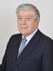 Giacomo Caliendo, politico italiano